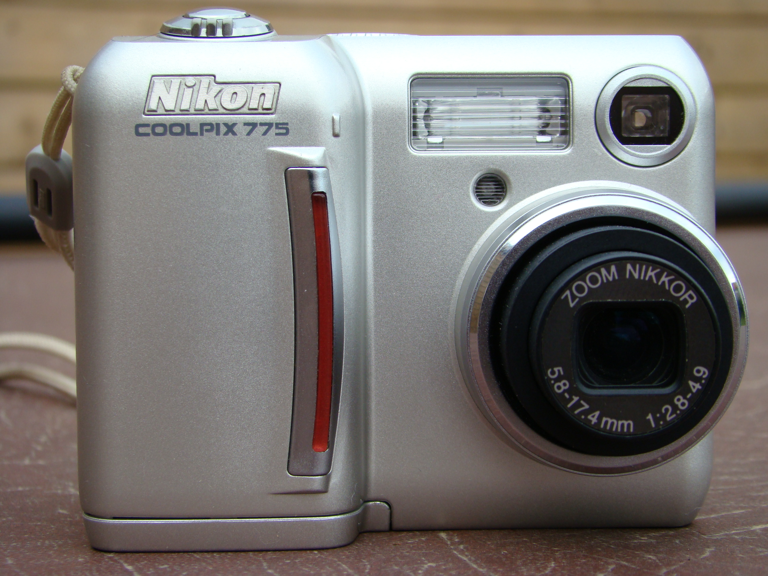 Nikon Coolpix 775